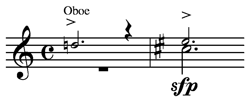 Cue notes